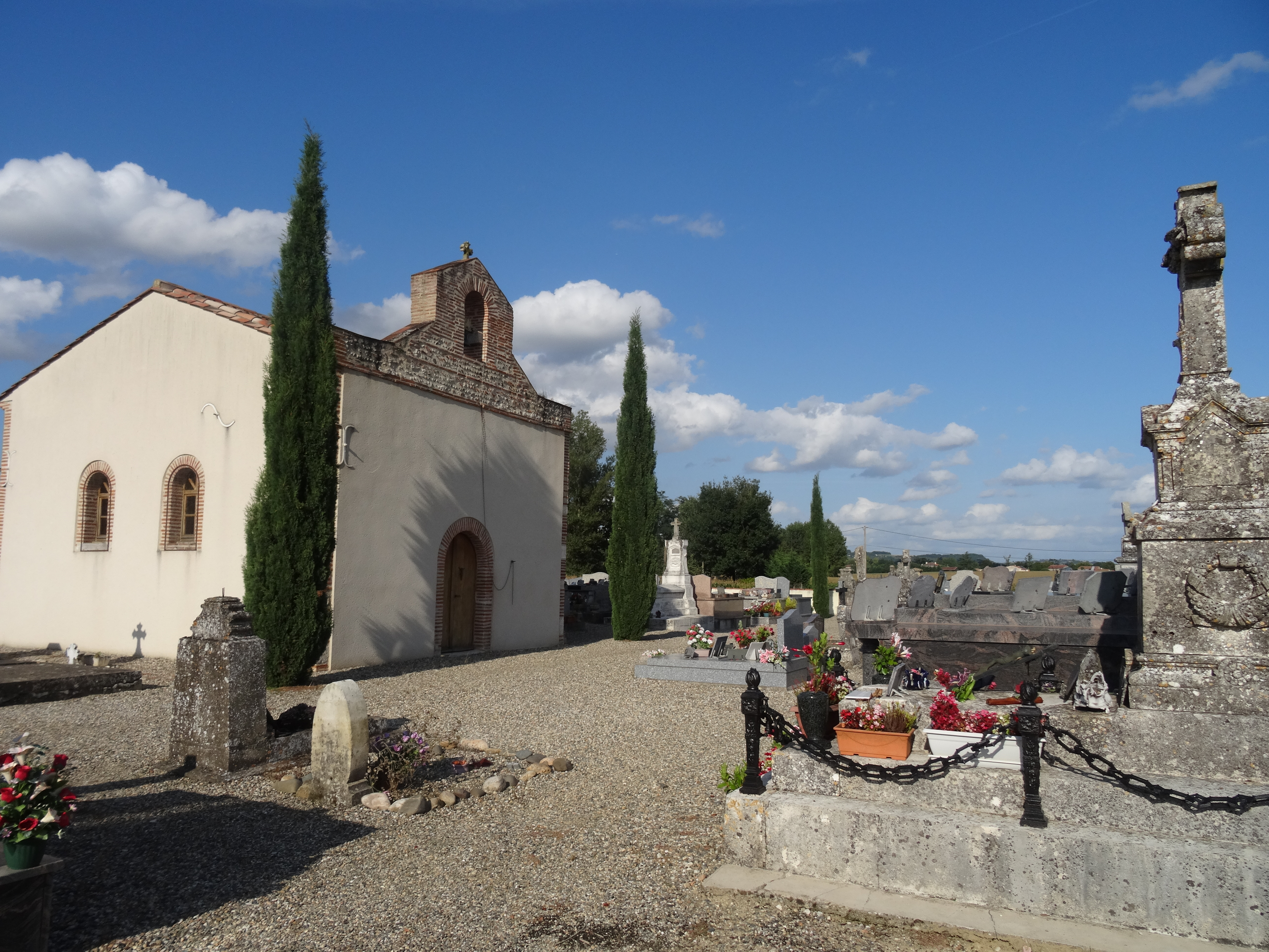 Sauveterre-Saint-Denis (47) : La Chapelle de Gudech au sein du cimetière